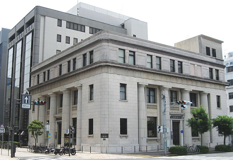 Shizuoka Bank HQ, 1931, ICP